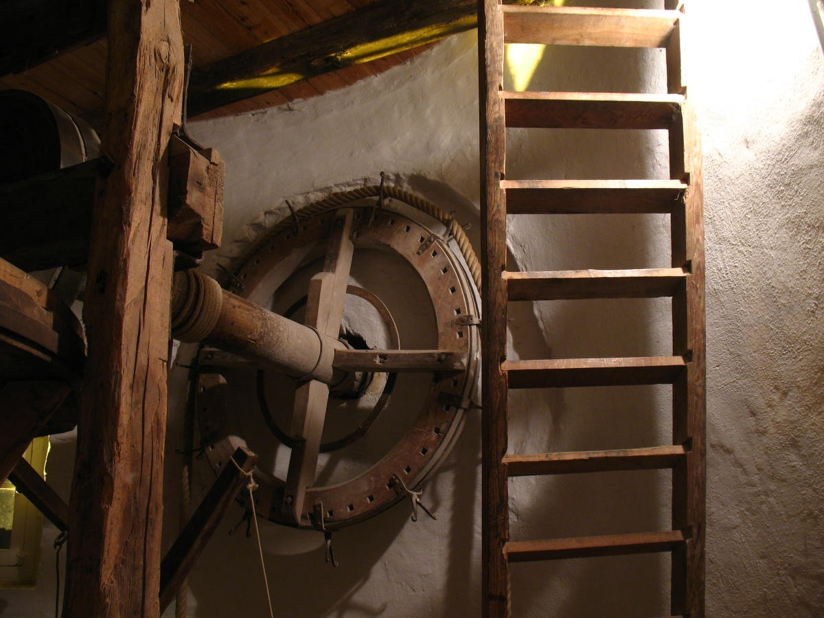 Arbeid Adelt te Weelde, provincie Antwerpen